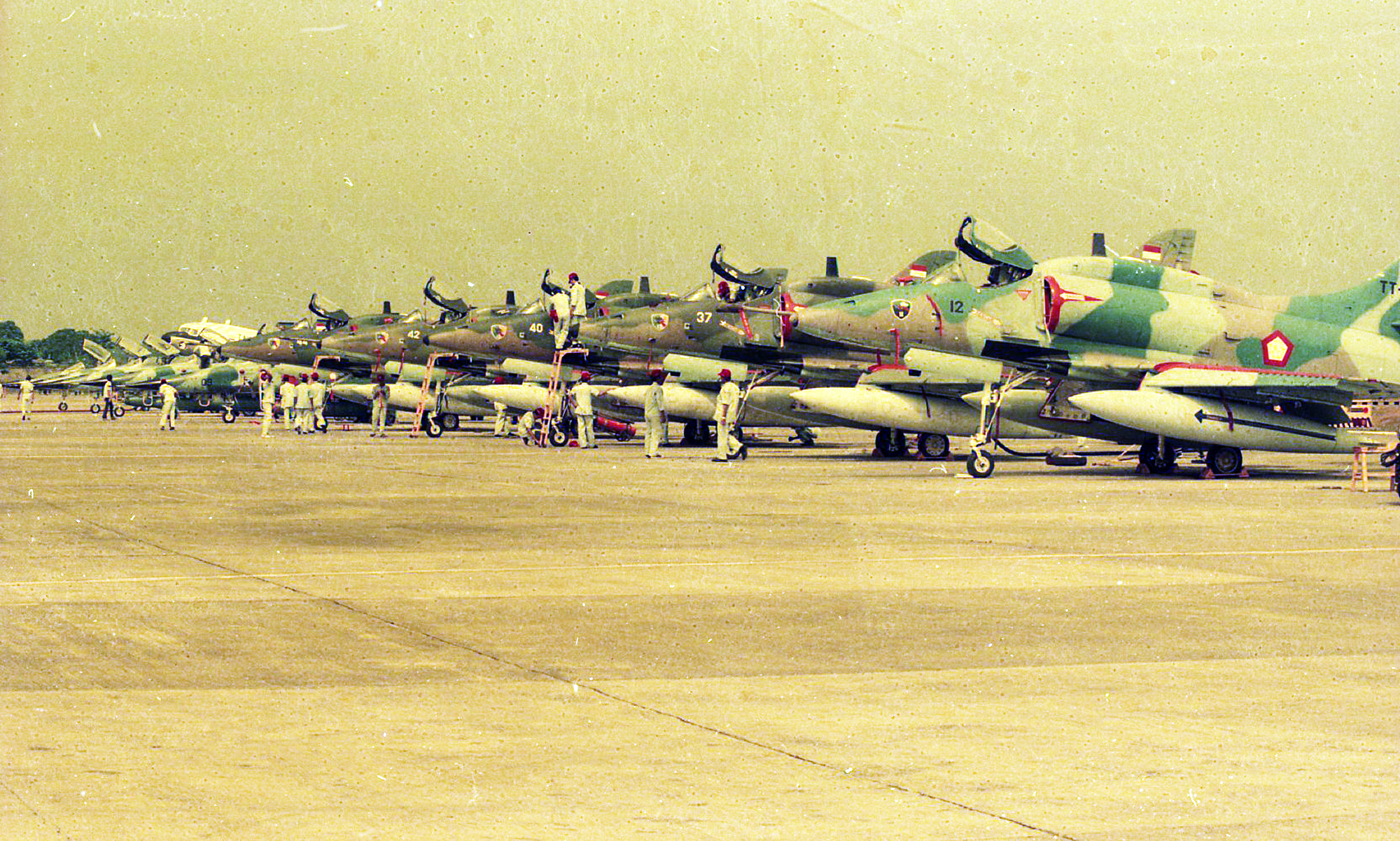 Skadron A-4 Skyhawk TNI AU